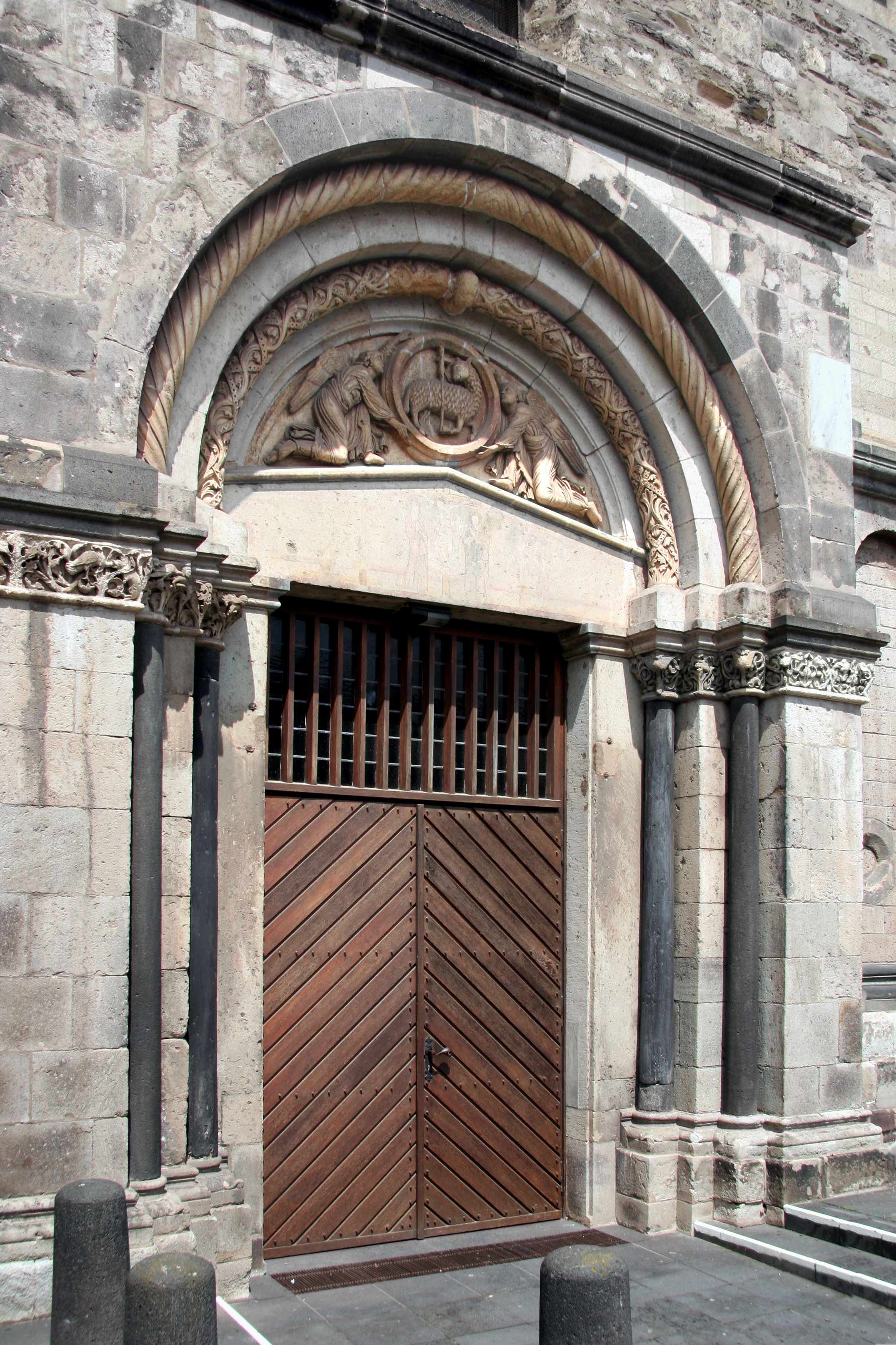 Andernach, Maria Himmelfahrt, Südportal